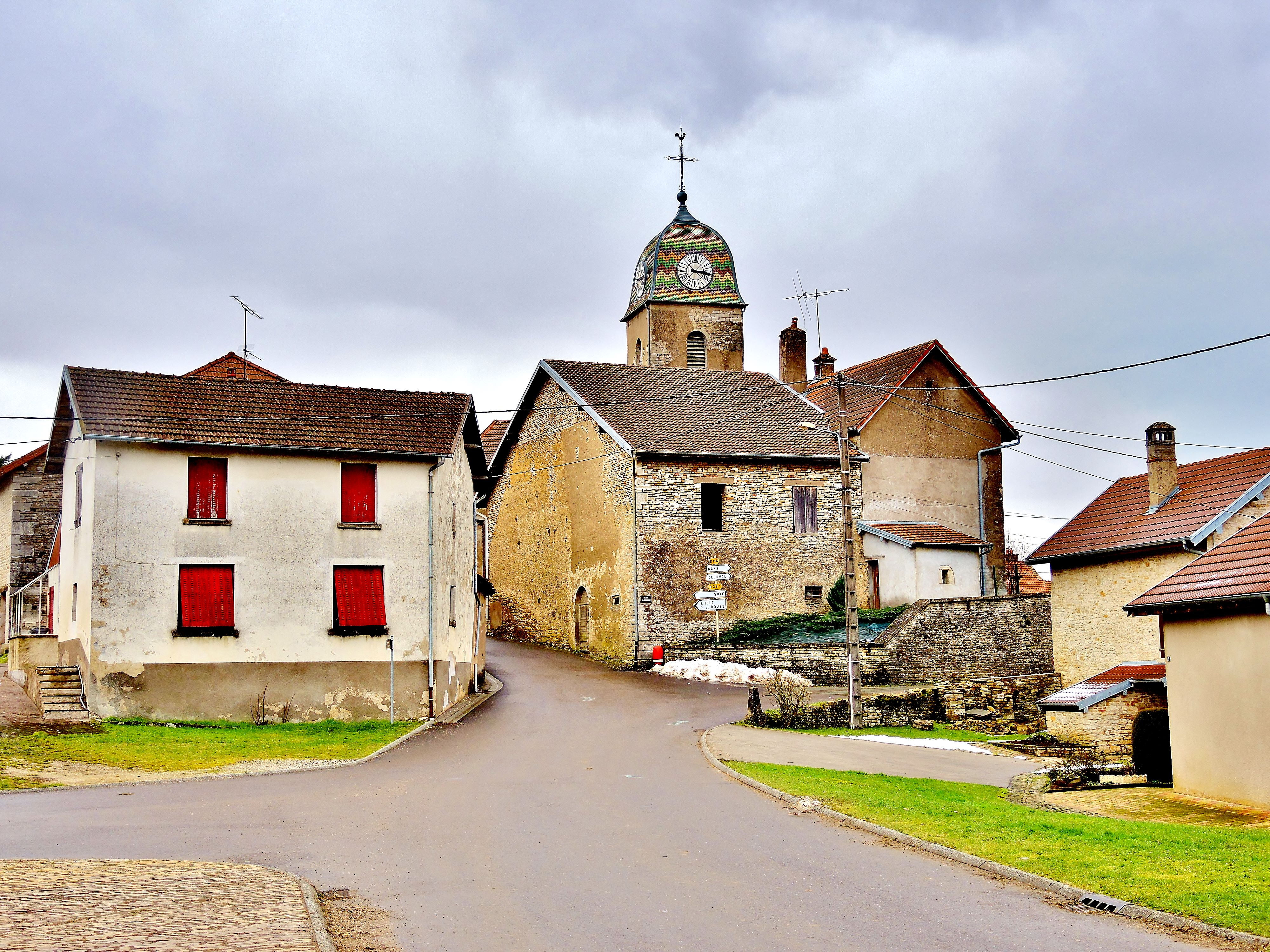 Entrée Nord du village d'Uzelle. Département du Doubs. France.